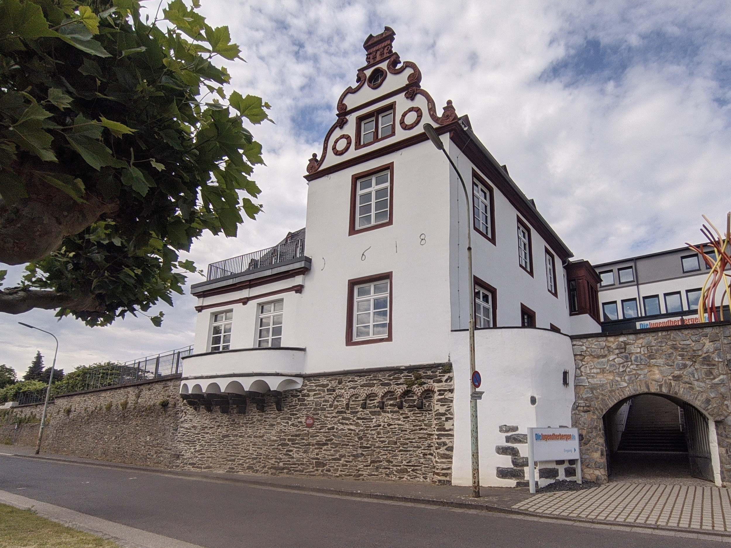 Zinn en 2020, vu coté Rhin